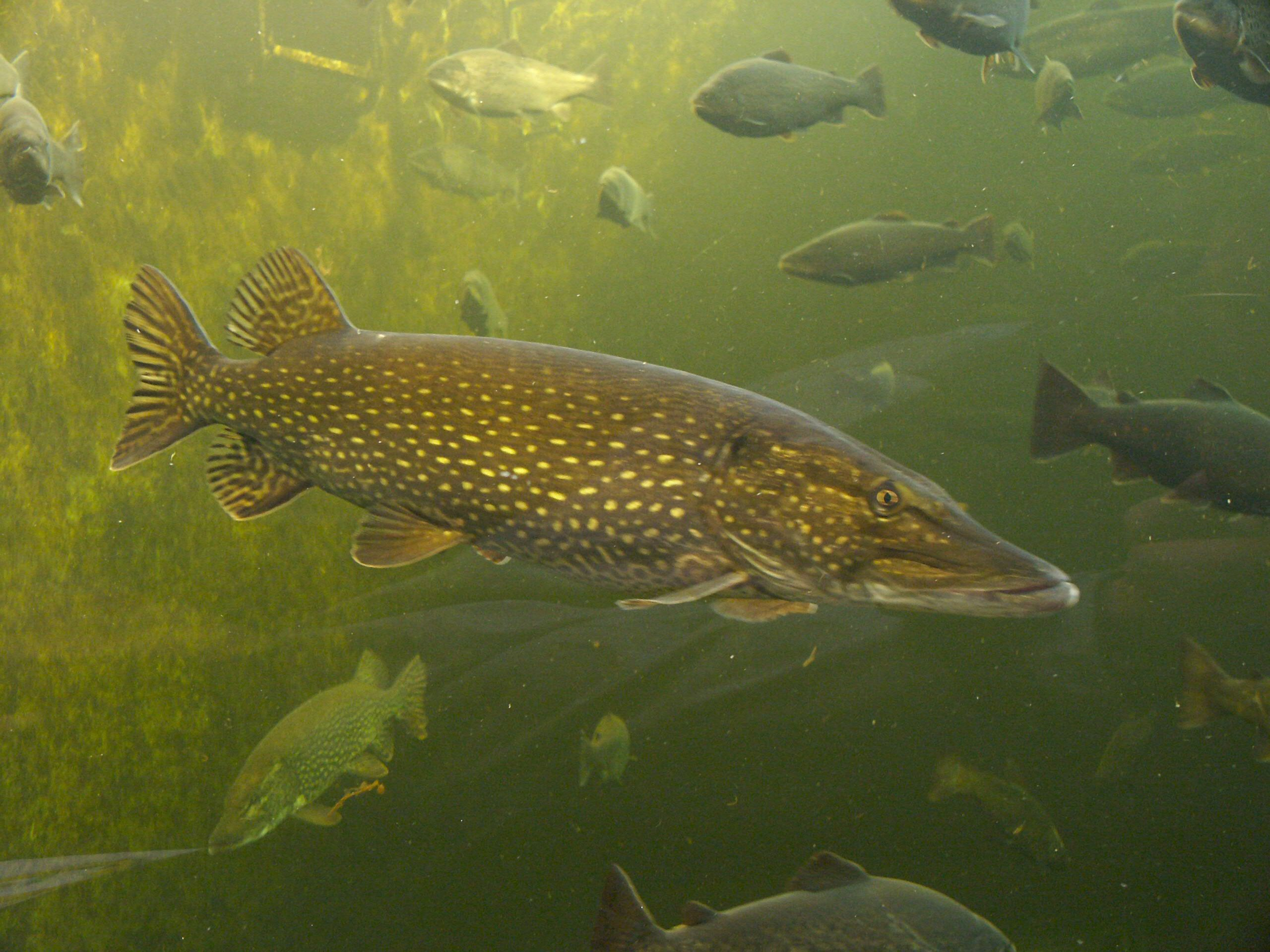 Europäischer Hecht (Esox lucius), Maretarium Kotka (Finnland) / Northern Pike (Esox lucius), Maretarium Kotka / Finland